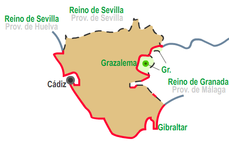 TERRITORIOS Fregenal - Pérdida Grazalema - Incroporación Nuevas Poblaciones de Andalucía y Sierra Morena Reino de Sevilla Reino anterior a 1833 Prov. de Málaga Provincia nueva de 1833 Gr: Granada - - - Límite de la provincia __ Límite del antiguo reino